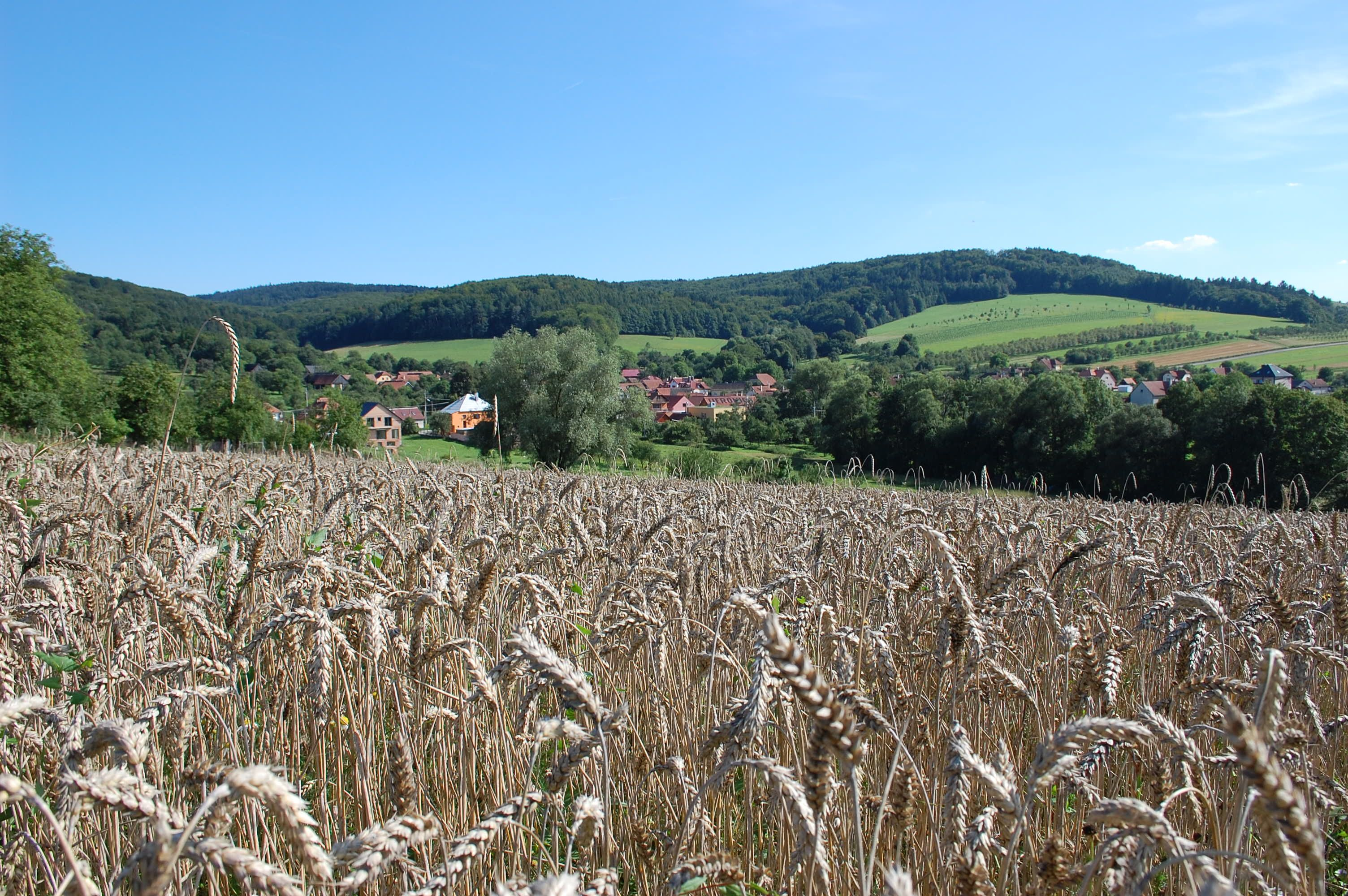 Pohled na Hostětín z Lepek (2012).